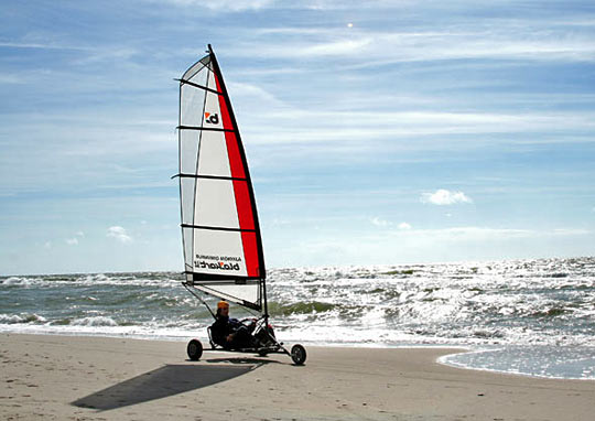 Land sailing in Nida, Lithuania